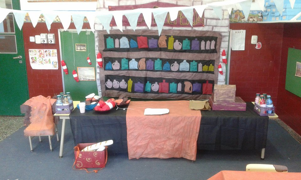 Pulpería realizada con material reciclado.